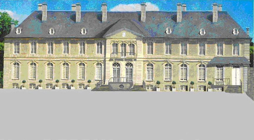 reconstitution du chateau de Loisey à partir d'archives